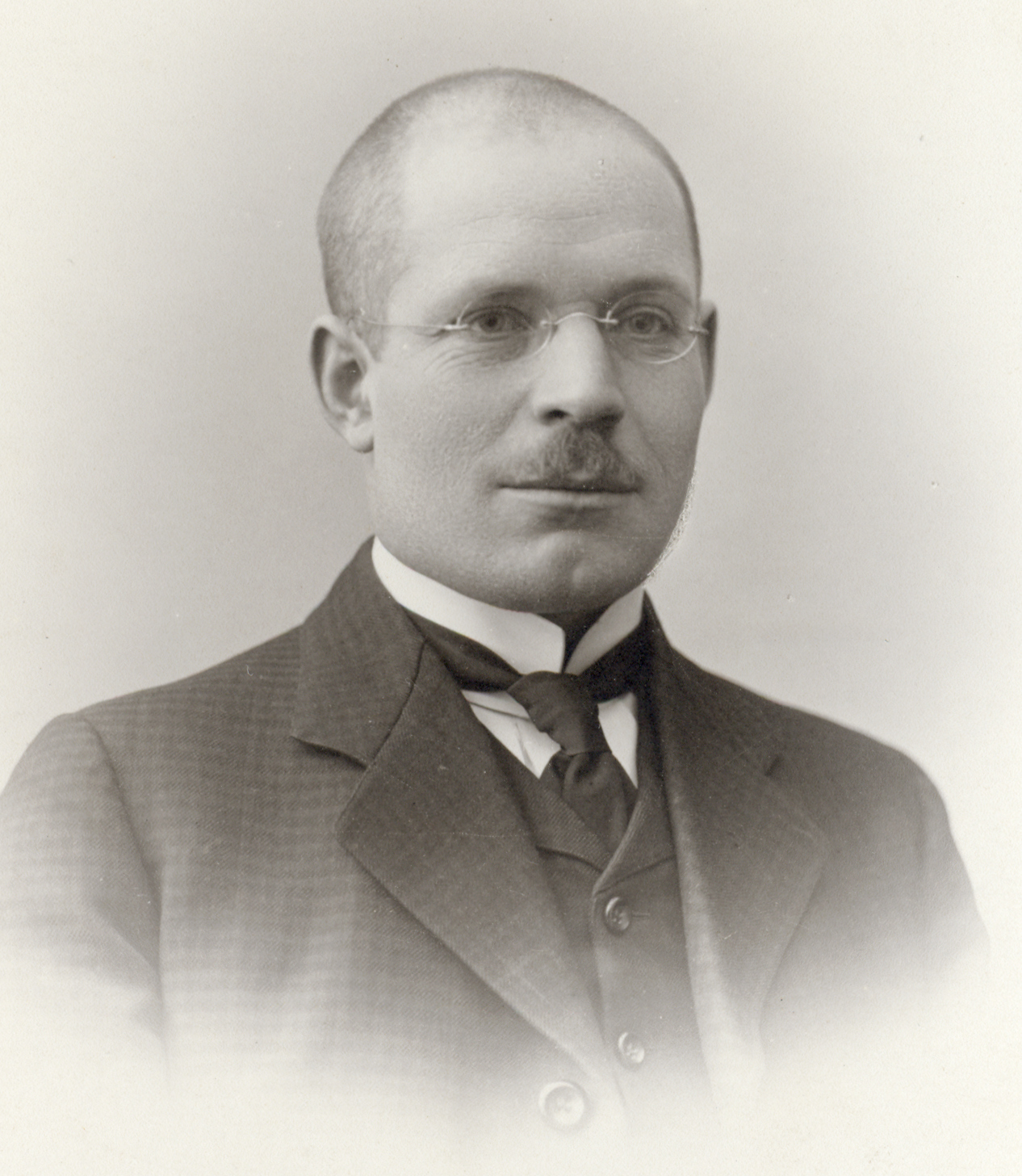 Nikolai Nilovitš Burdenko